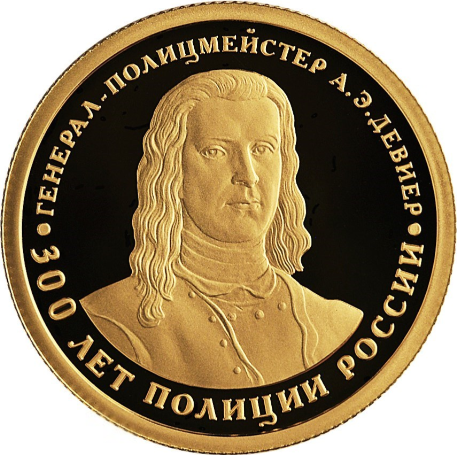 Монета Банка России, 300 лет полиции России — Антон Девиер. 50 рублей, золото, реверс, пруф. Портрет первого генерал-полицмейстера России А. Девиера, вдоль канта — надписи, разделенные точками, вверху: «ГЕНЕРАЛ-ПОЛИЦМЕЙСТЕР А.Э. ДЕВИЕР», внизу: «300 ЛЕТ ПОЛИЦИИ РОССИИ». Чеканка — Санкт-Петербургский монетный двор. Художник: А.А. Брынза. Скульптор: М.П. Титов.